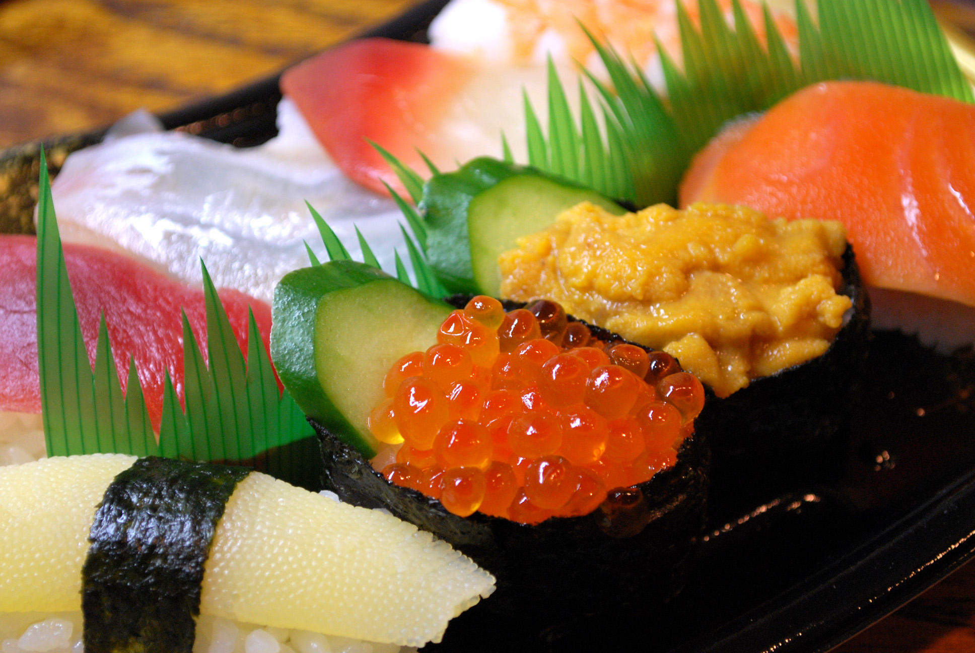 パックで買ったお寿司をできるだけうまそうに撮ってみようじゃん！と、食べるのガマンして夜中に何やってるんだろうね、の10月8、いやもう9日か。(笑)